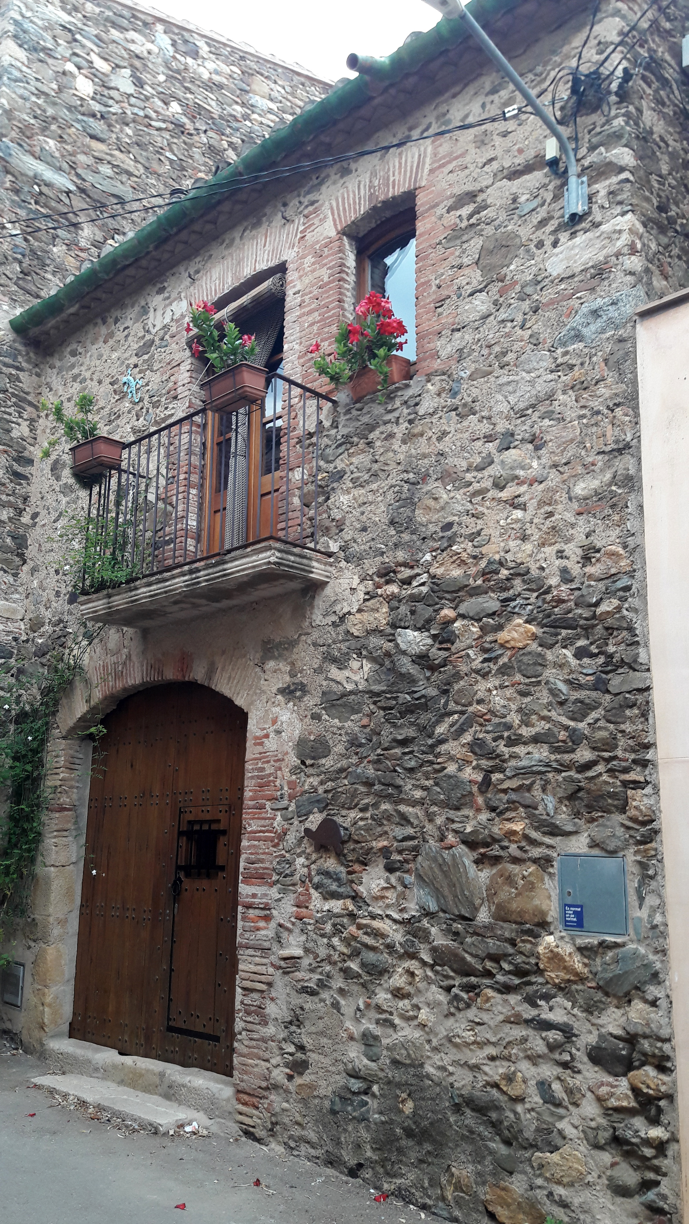 Casa al carrer Principal, 4 (Garriguella)